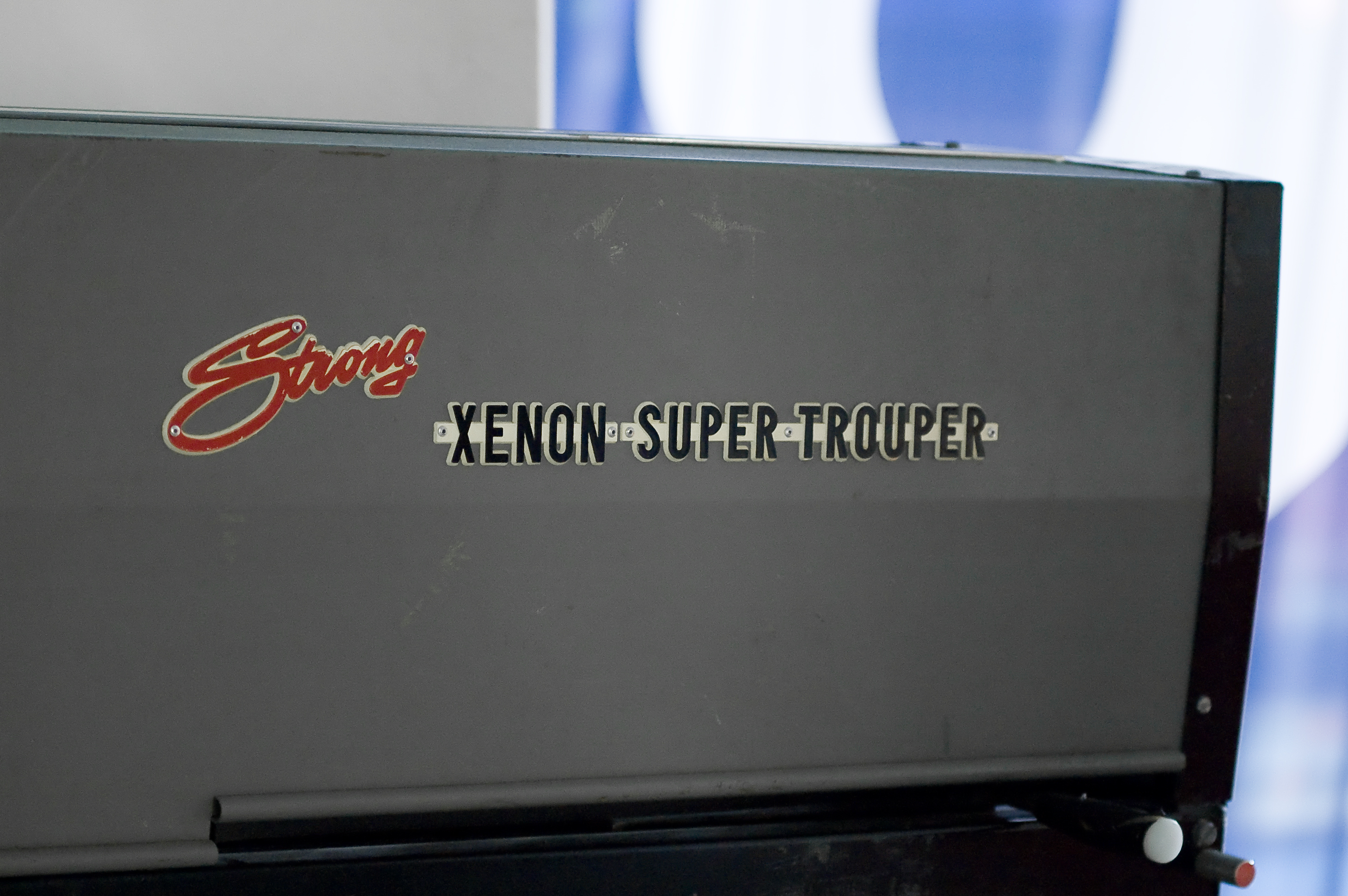 Ein Super-Trouper-Scheinwerfer von Strong Electric (Detailansicht)